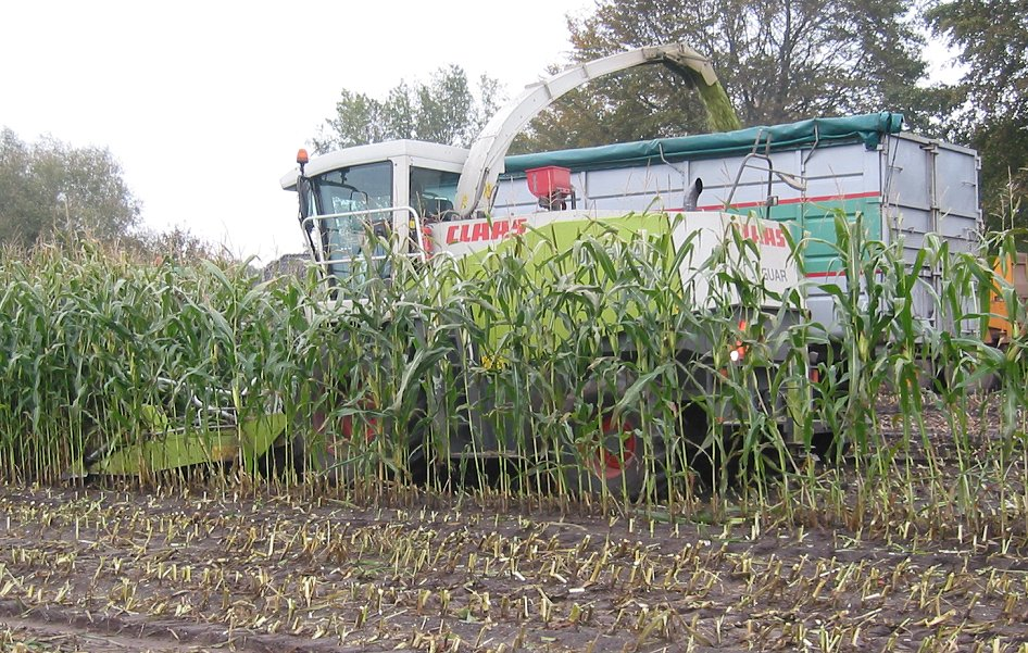 Maisernte mit Claas Jaguar 870 im Oktober.